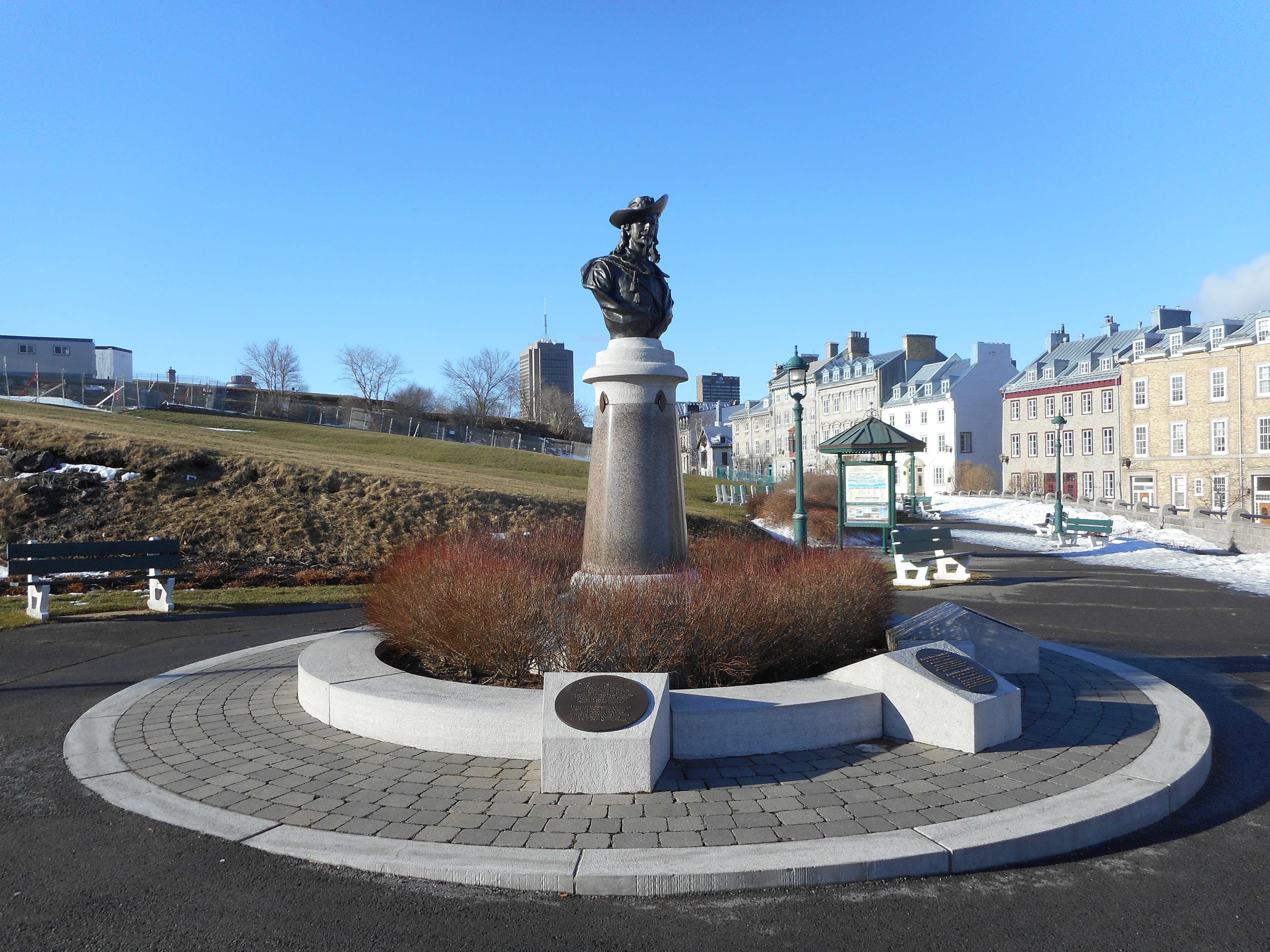 Monument de Pierre Du Gua de Monts, par Hamilton MacCarthy, érigé en 2007 sur l'avenue Saint-Denis, près de la Citadelle de Québec